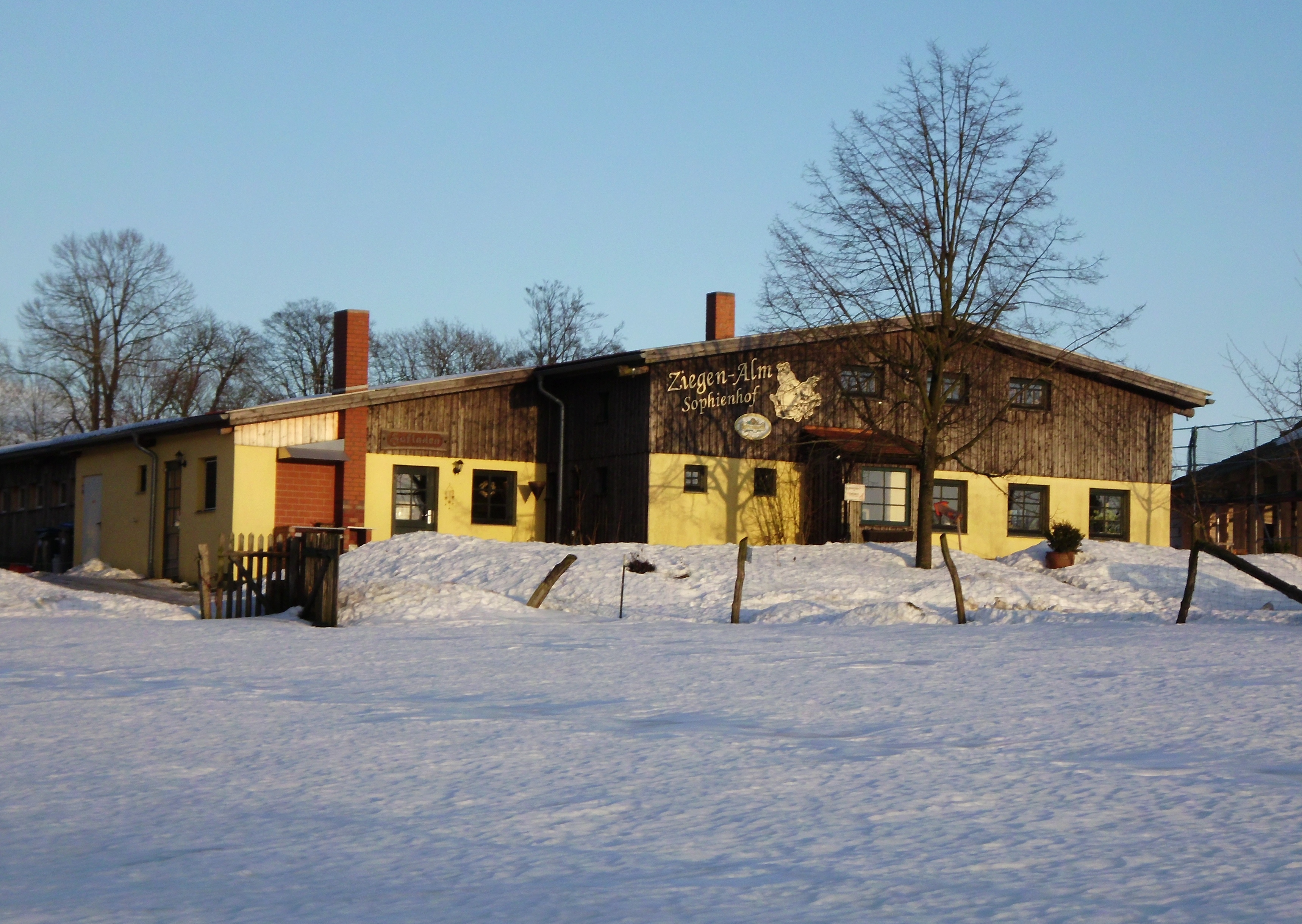 Ziegenalm in Sophienhof, Gemeinde Harztor